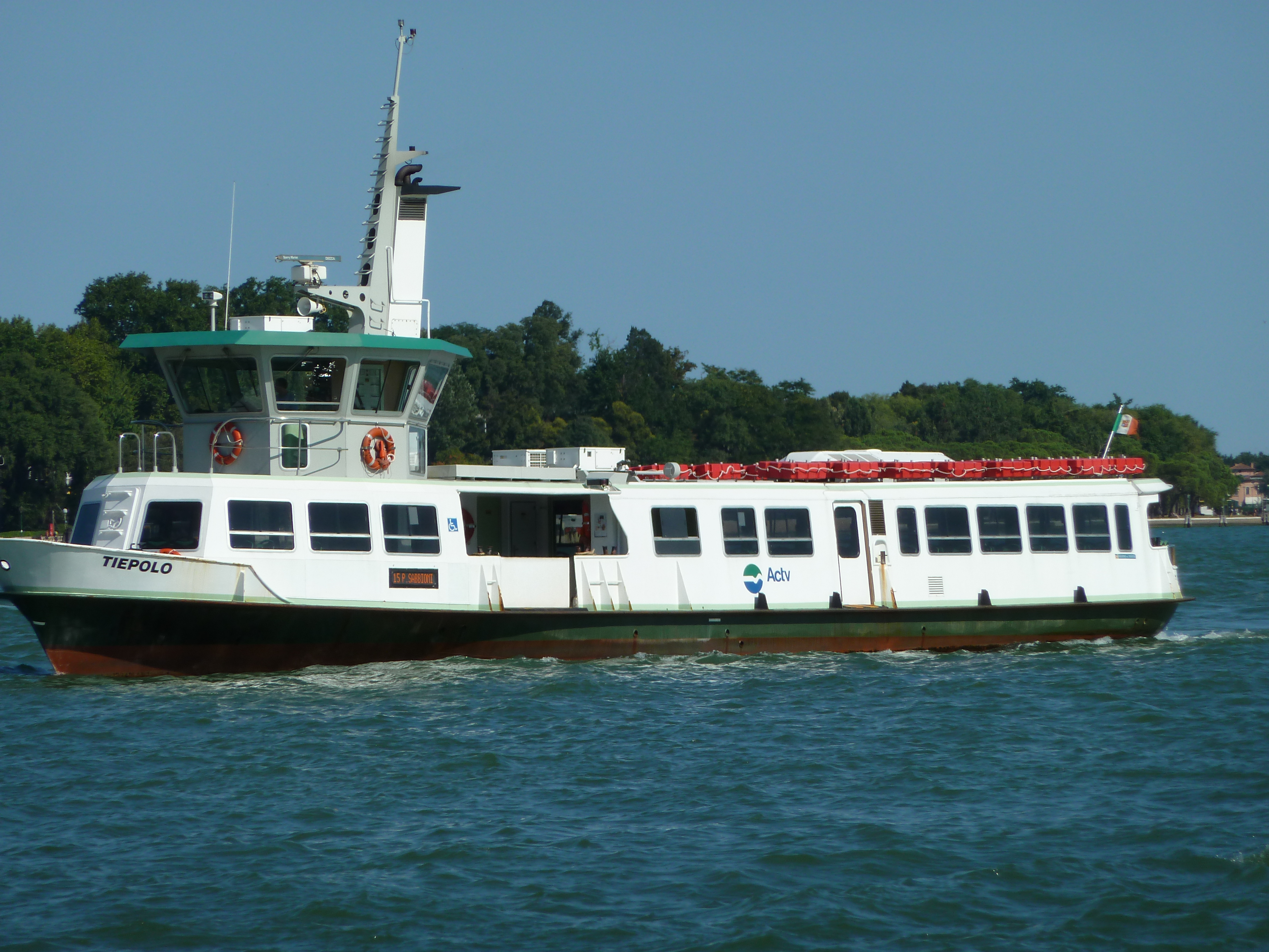 Tiepolo